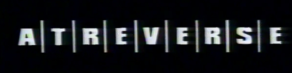 Cartel mostrado antes de comenzar cada capítulo